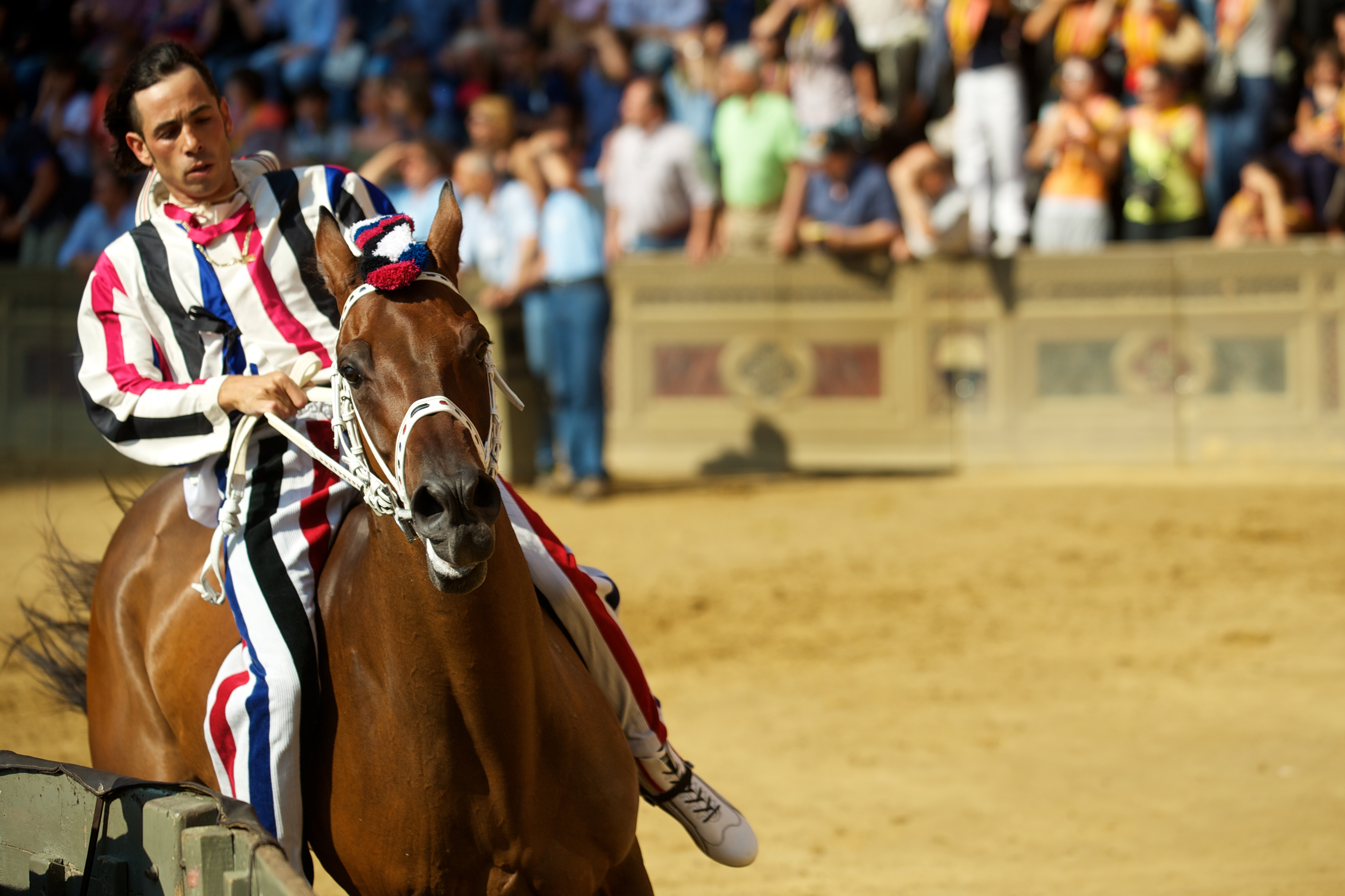 Istrice con Moedi montato da Walter Pusceddu detto Bighino.